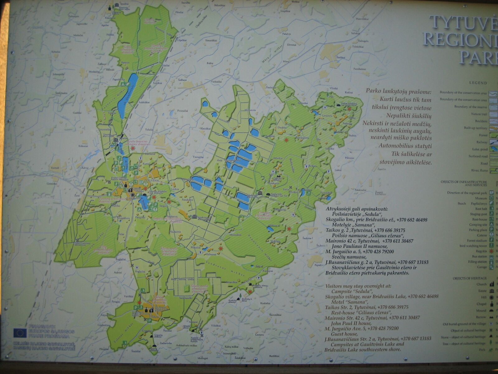 Parko informacinė lenta prie kelio Šiluva–Raseiniai.